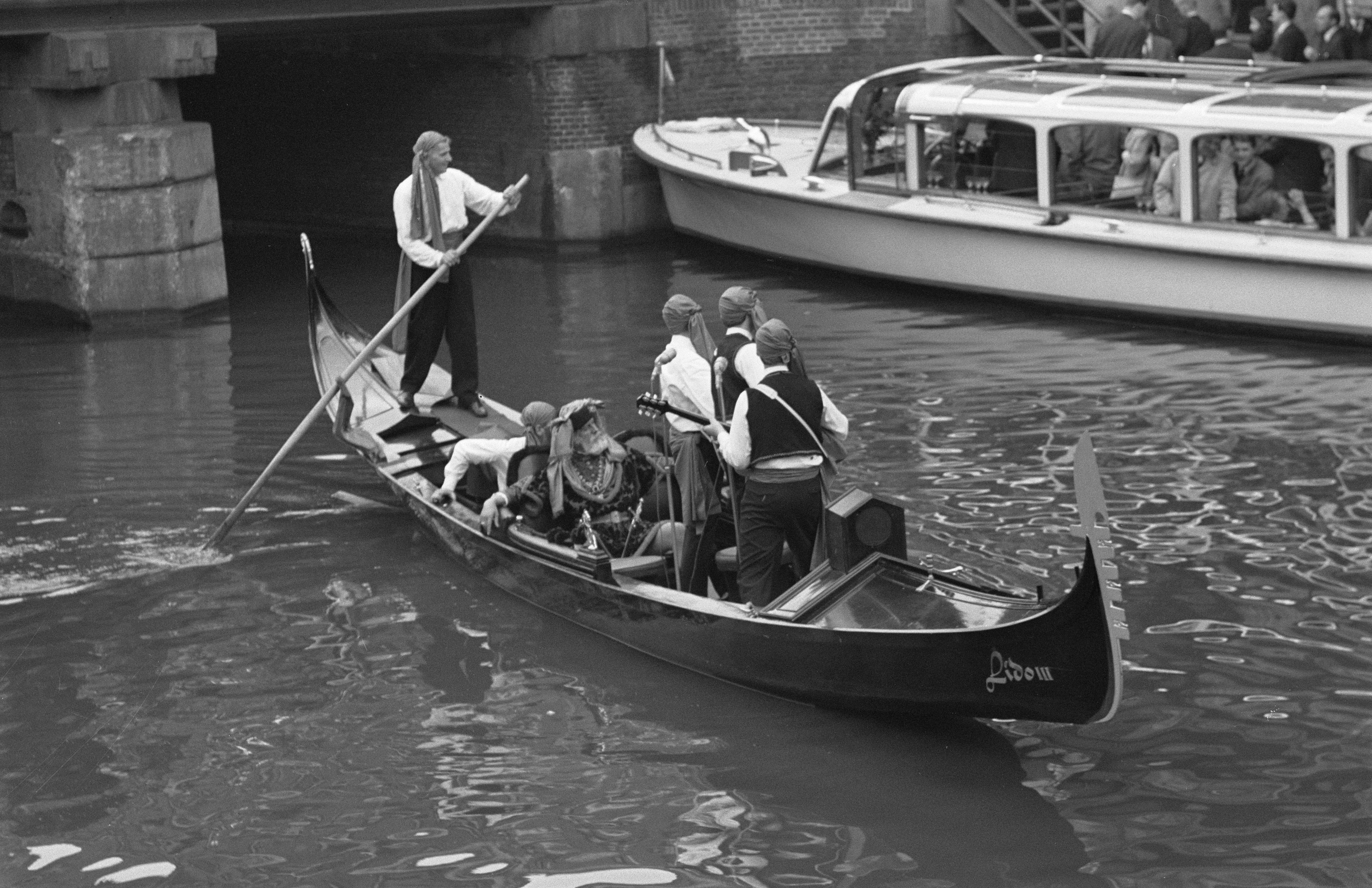 Collectie / Archief : Fotocollectie Anefo Reportage / Serie : [ onbekend ] Beschrijving : Opening nieuw Italiaans restaurant in de Vijzelstraat Amsterdam, Doge in de gondel bij de Munt Datum : 18 augustus 1960 Locatie : Amsterdam, Noord-Holland Trefwoorden : Openingen, restaurants Persoonsnaam : Doge, Munt Fotograaf : Rossem, Wim van / Anefo Auteursrechthebbende : Nationaal Archief Materiaalsoort : Negatief (zwart/wit) Nummer archiefinventaris : bekijk toegang 2.24.01.05 Bestanddeelnummer : 911-5114